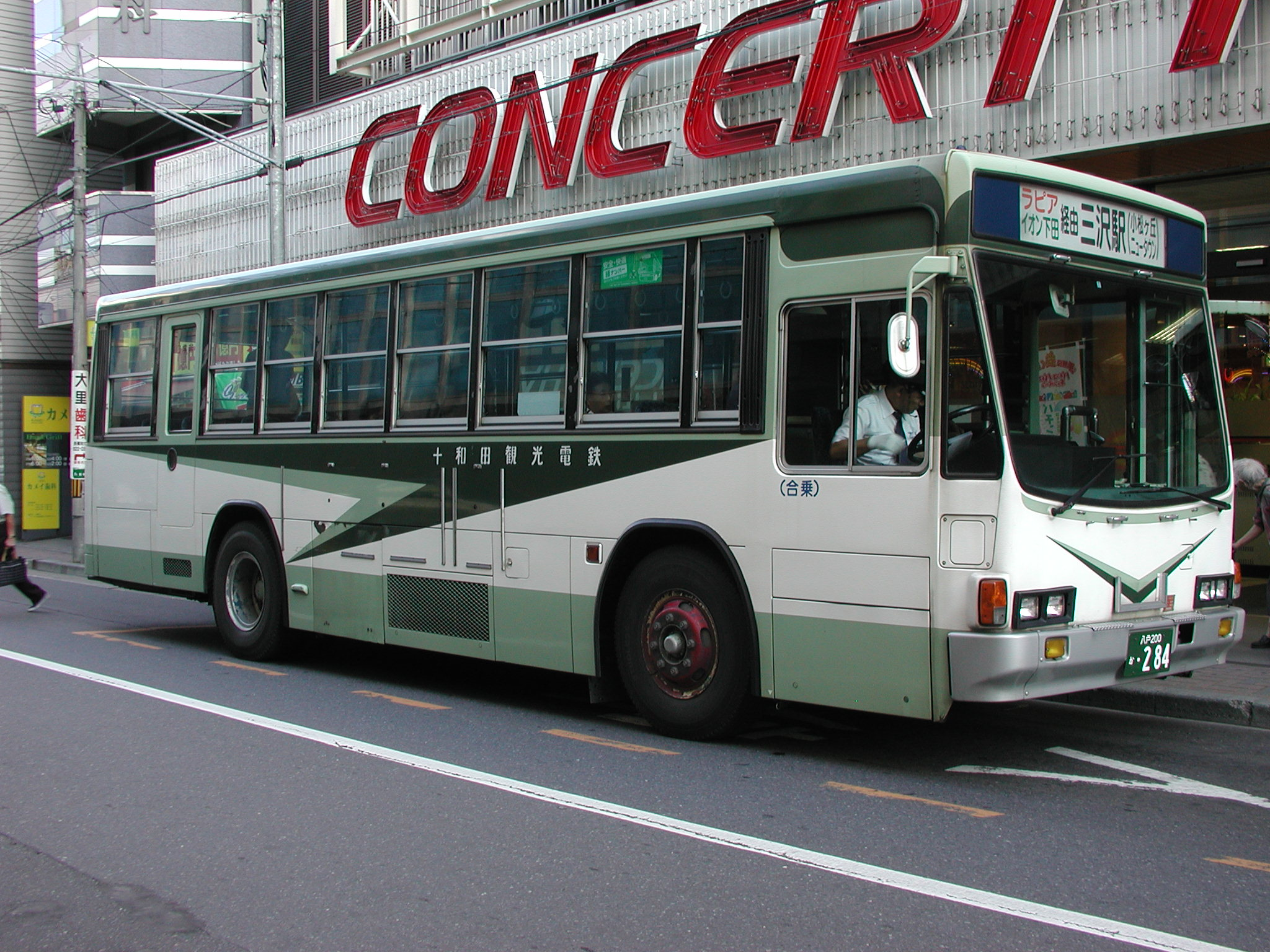 十和田観光電鉄バス 一般路線塗装：国際興業グループカラー（いすゞ・キュービック：U-LV324K） ） 六日町バス停（八戸市）付近にて